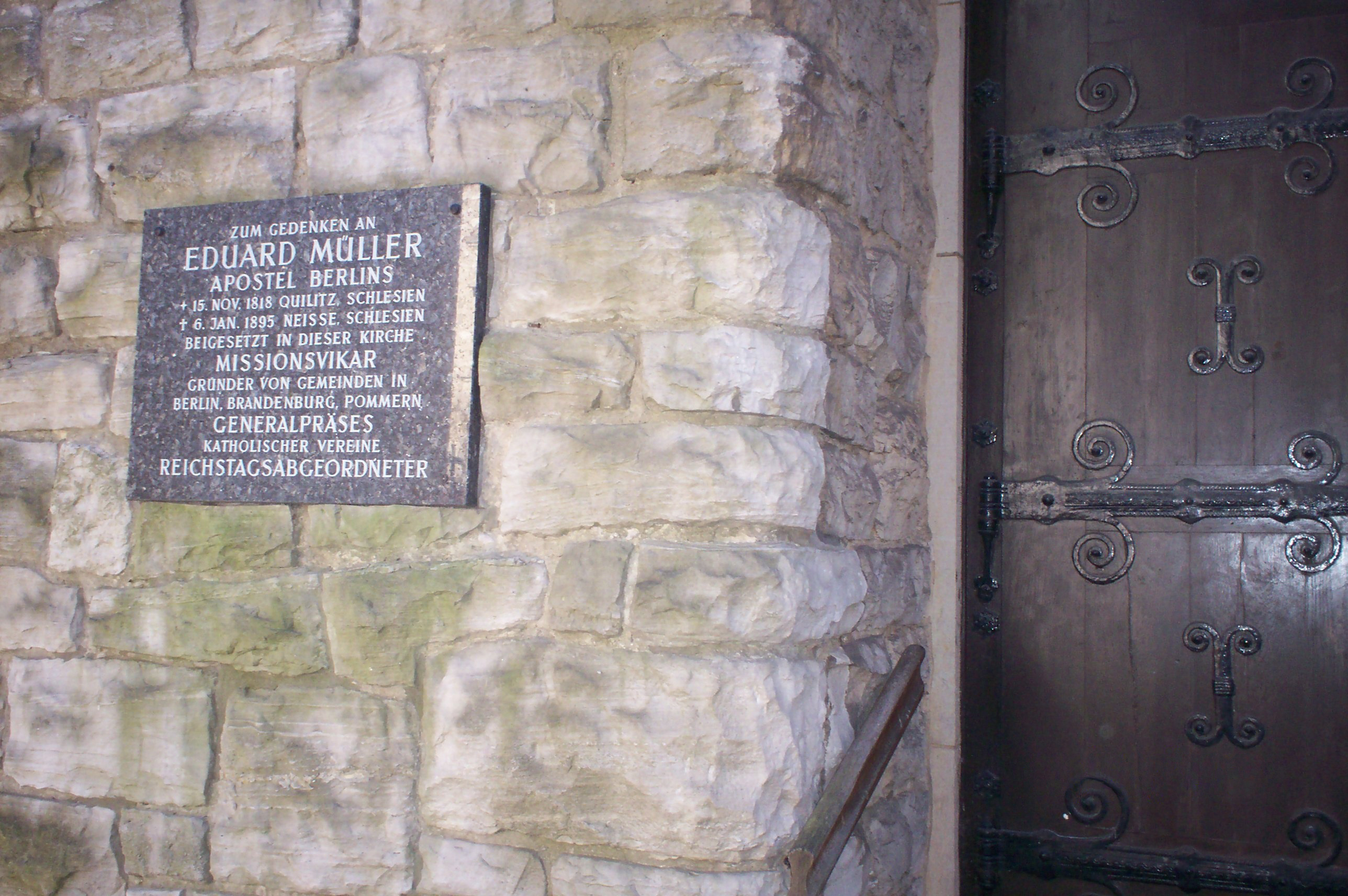 Die St. Eduardkirche in Berlin: Tafel zur Erinnerung an Eduard Müller, genannt Apostel Berlins.